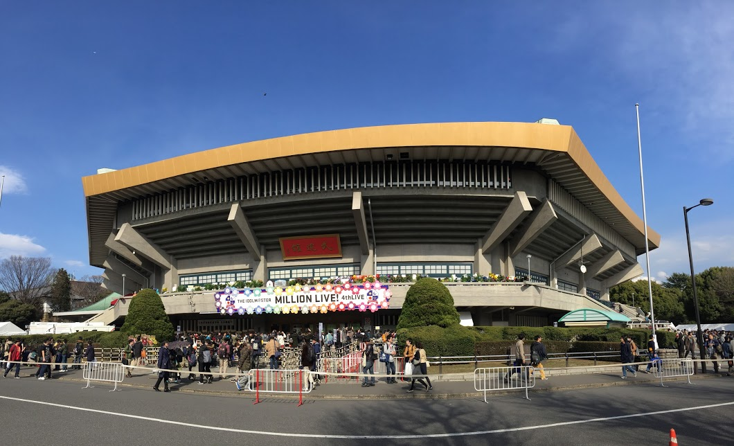 2017年3月10日から12日に行われたのイベント「THE IDOLM@STER MILLION LIVE! 4thLIVE TH@NK YOU for SMILE!!」の会場の様子を撮影した写真。